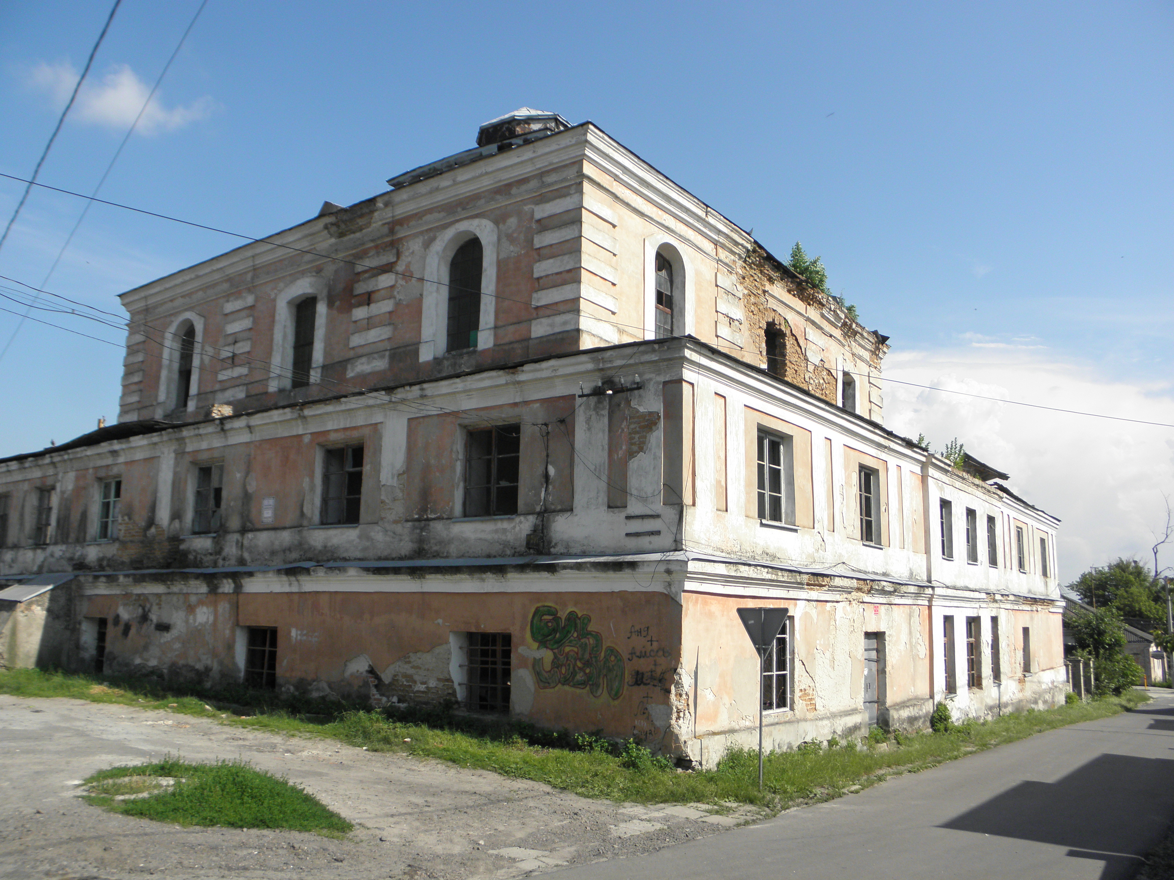 Синагога (мур.), Дубно, вул.Кирила і Мефодія, 23